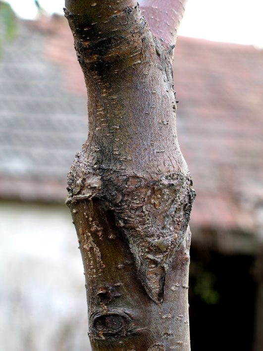 Description = Zweijährige Geißfußveredelung Source = photo taken by Kobako Date = Dec. 2005 Author = Kobako